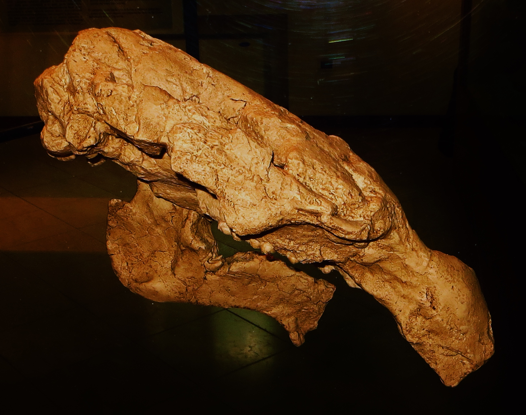 Fossil of Prototherium- Museo Paleontologico di Roncà